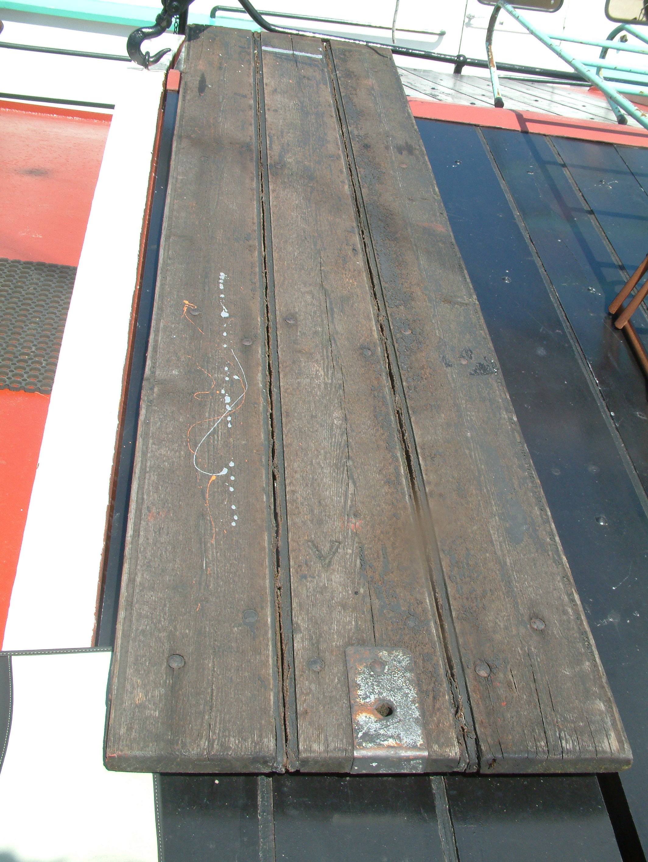 Luik van de Elisabeth.